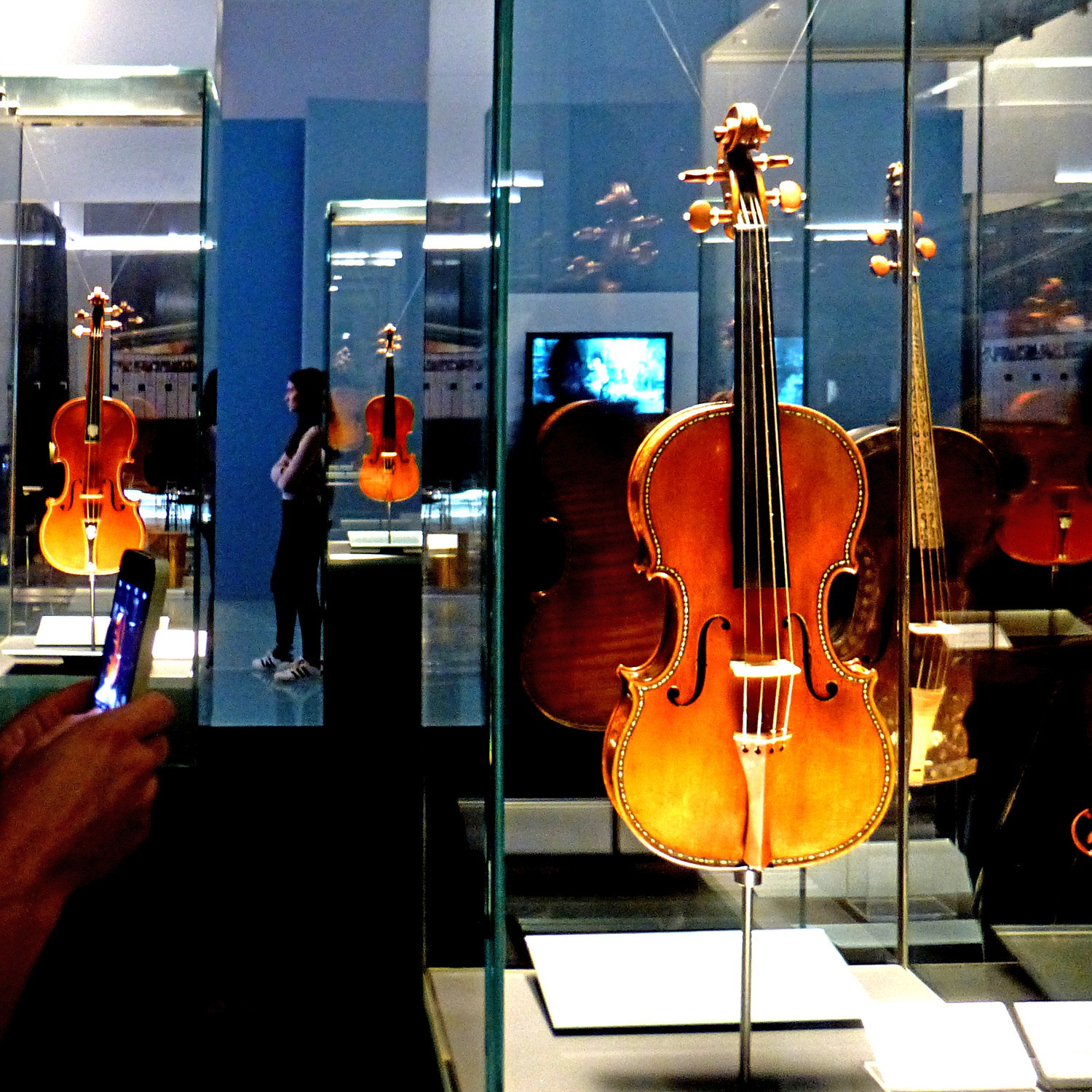 Cremona, Museo del Violino